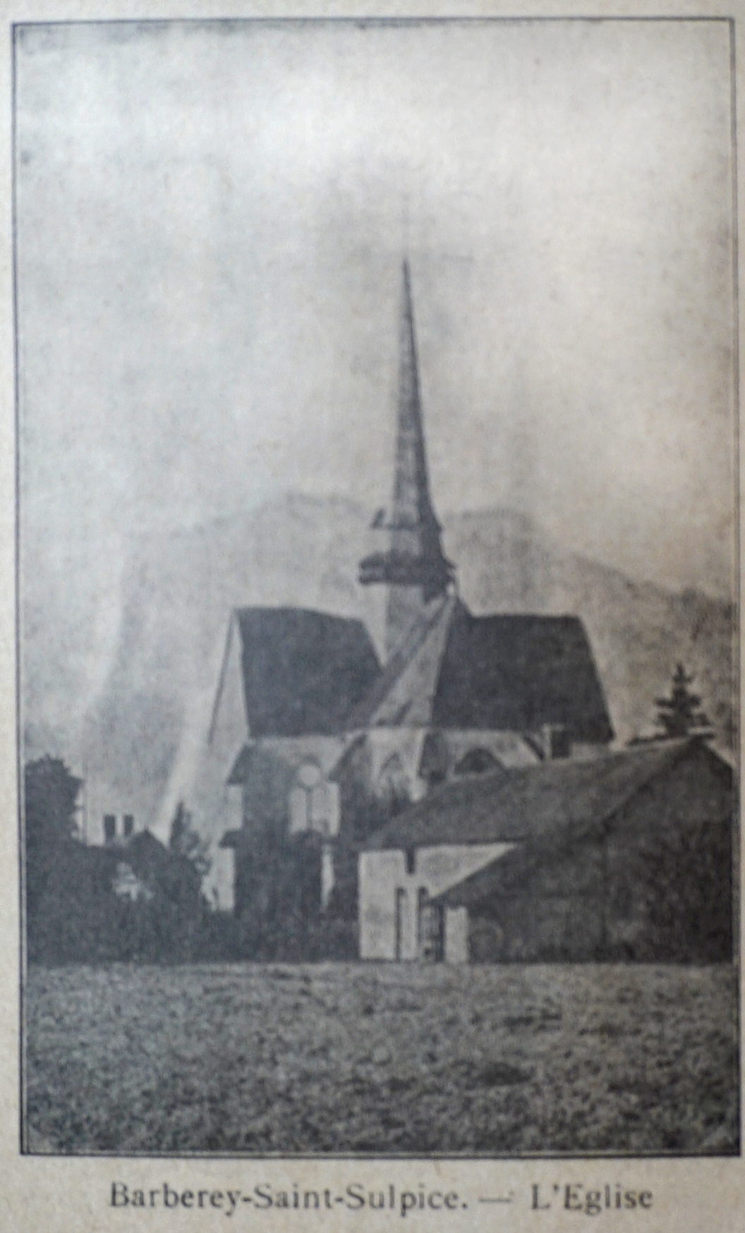 une vue de l'église publiée en 1902.